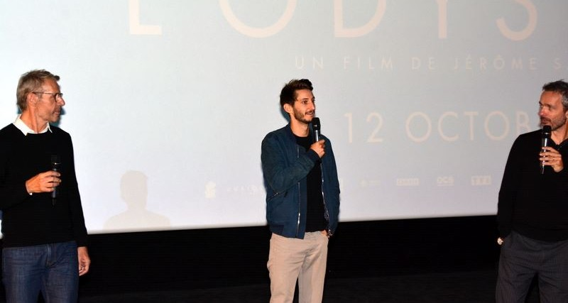 Lambert Wilson, Pierre Niney et Jérôme Salle à l'avant-première de "L'Odyssée" à l'UGC Parinor (Aulnay-sous-Bois)